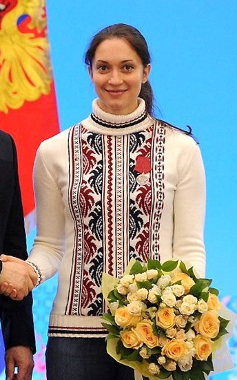 Медалью ордена «За заслуги перед Отечеством» второй степени награждена бронзовый призёр Олимпийских игр в скоростном беге на коньках Екатерина Шихова.